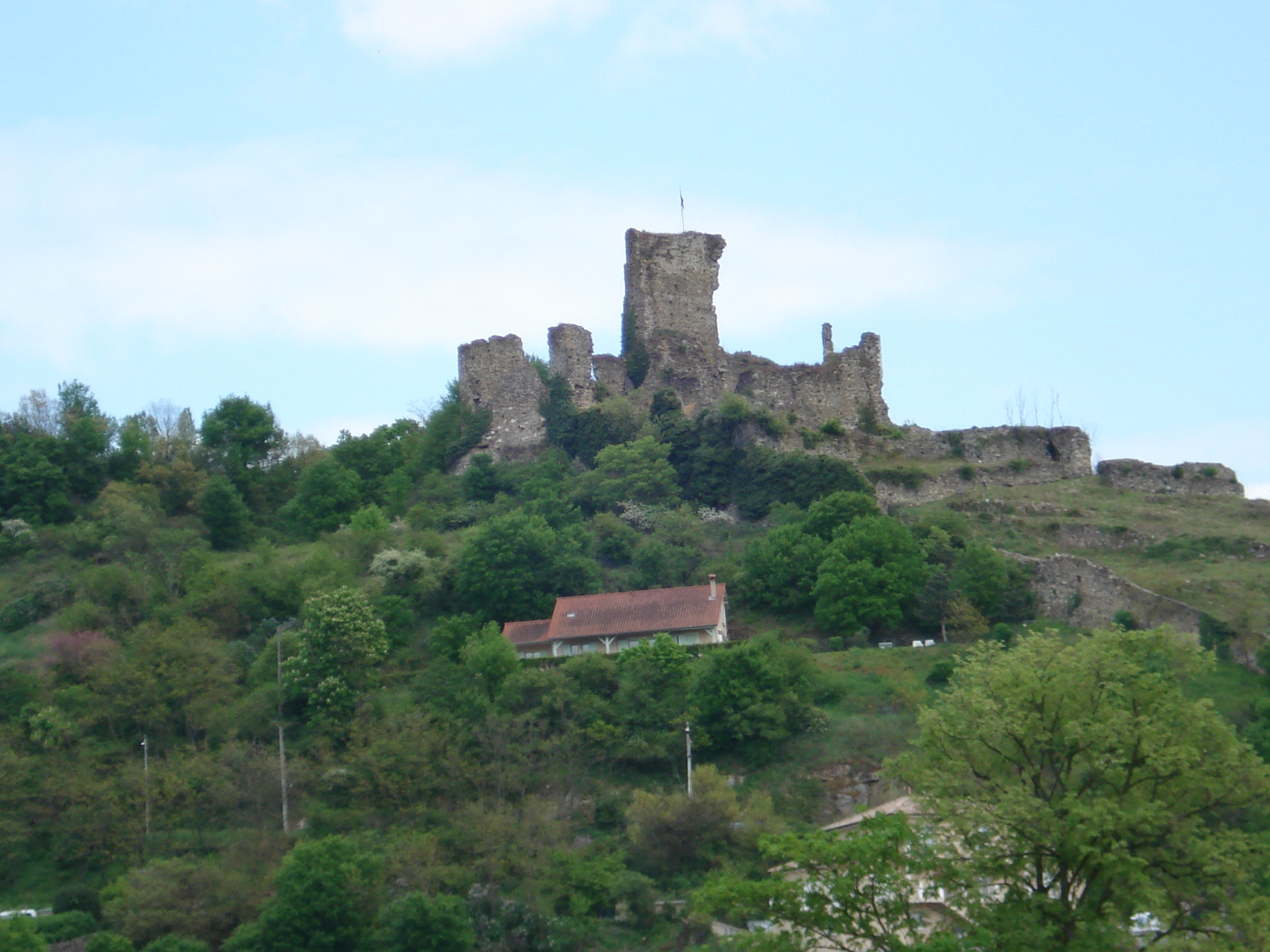 château de la Batie (XIIIème siècle) à Vienne (Isère)